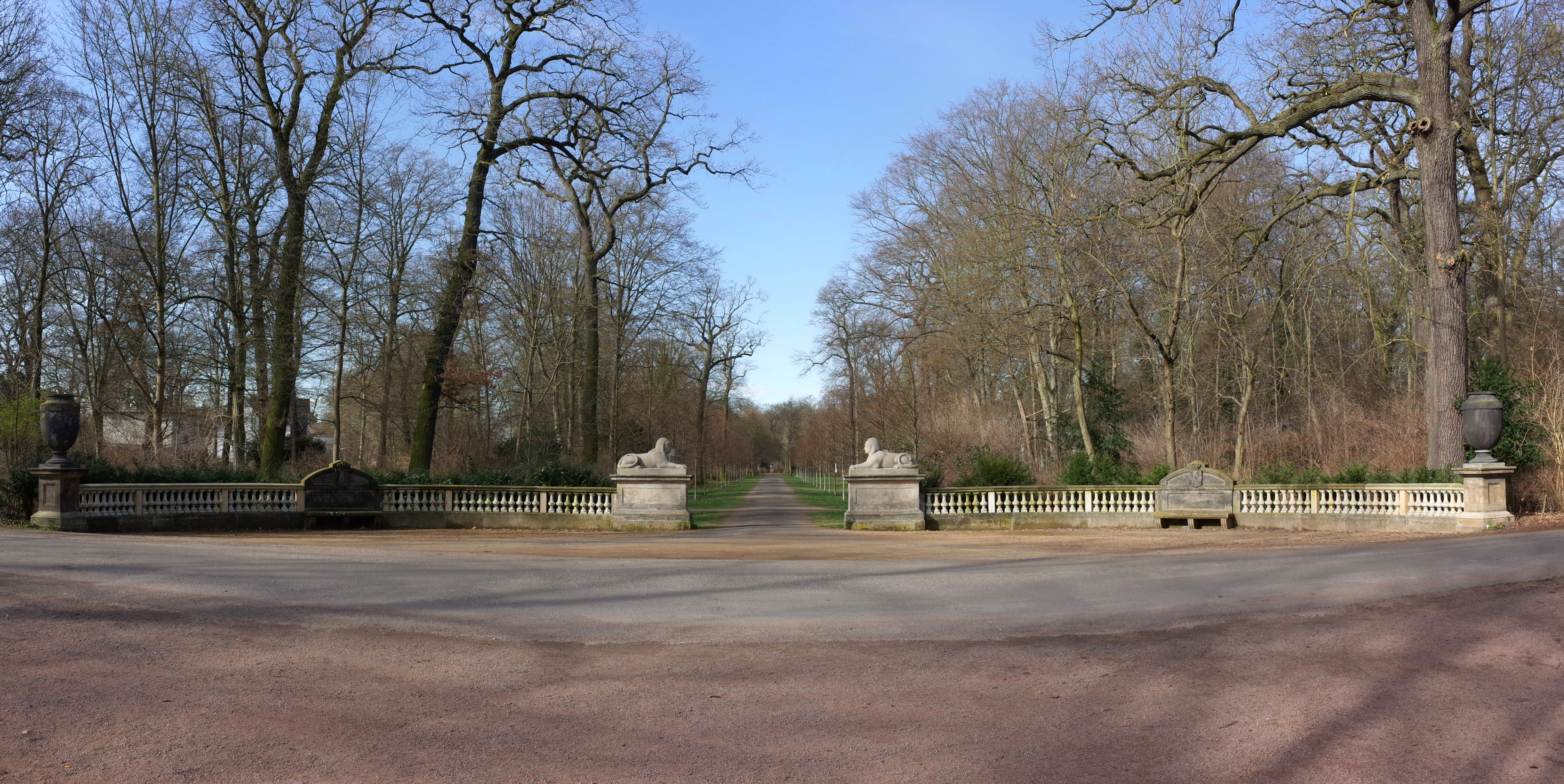 Dessau-Roßlau, Restaurierte Sphingen am Haupteingang zum Georgium